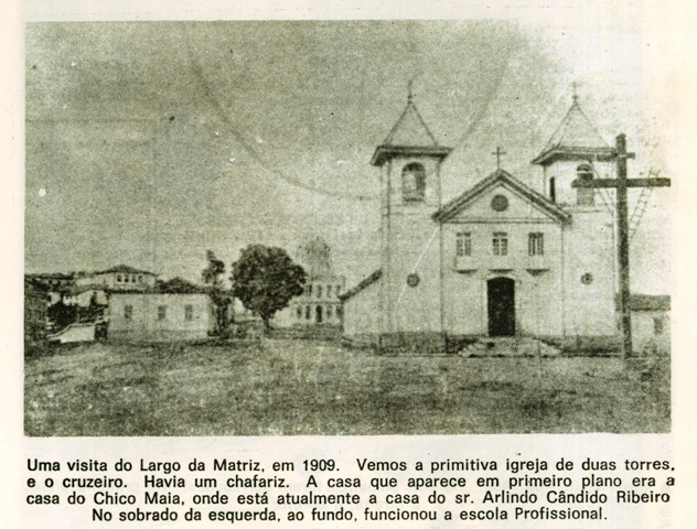 Paróquia Santuário Imaculada Conceição de Caconde